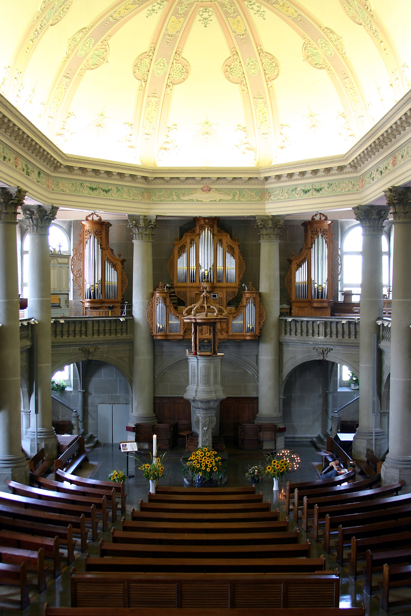 Heiliggeistkirche, Bern, Schweiz